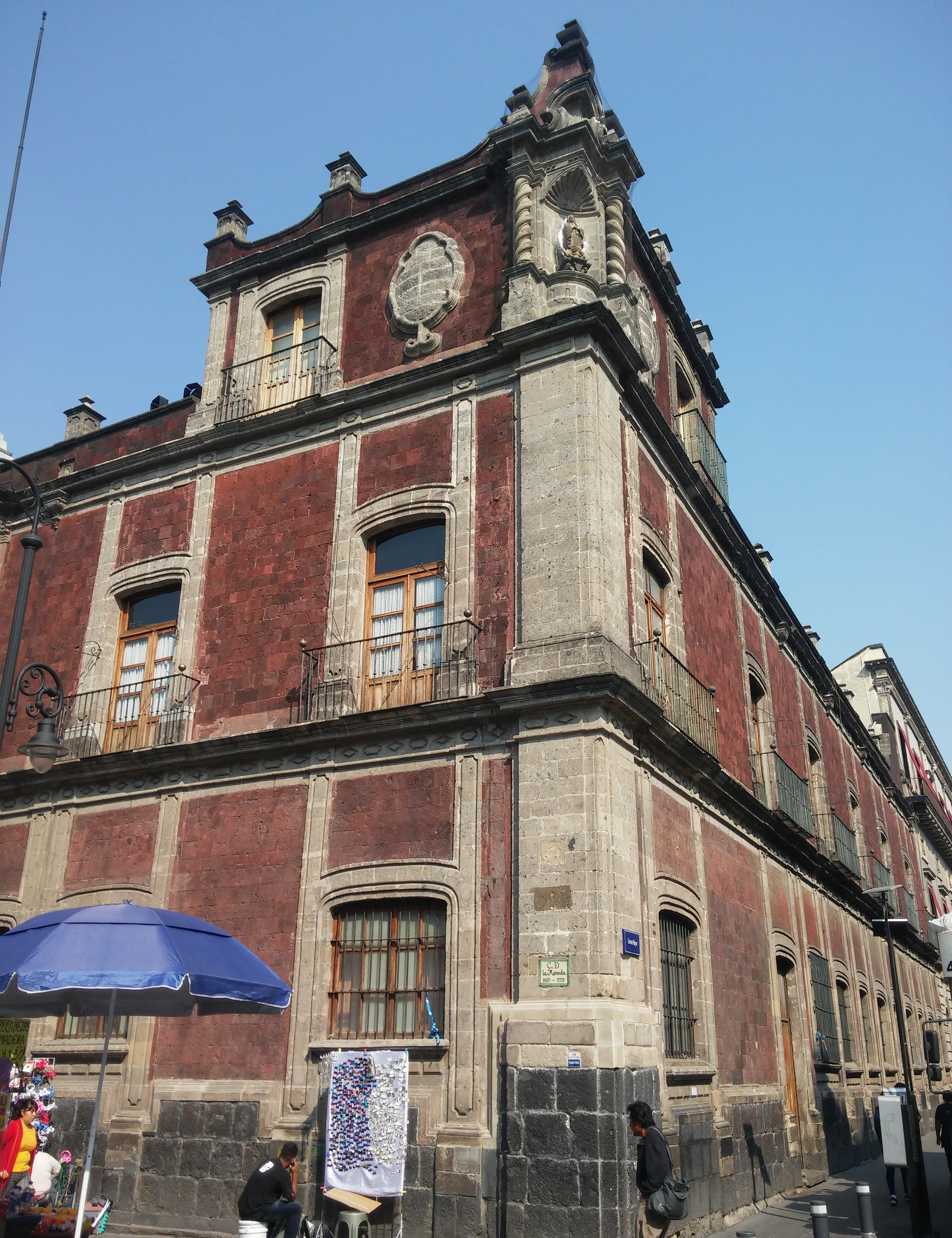 Casa principal del Mayorazgo de Guerrero en Moneda 14-16 en el centro histórico de la ciudad de México